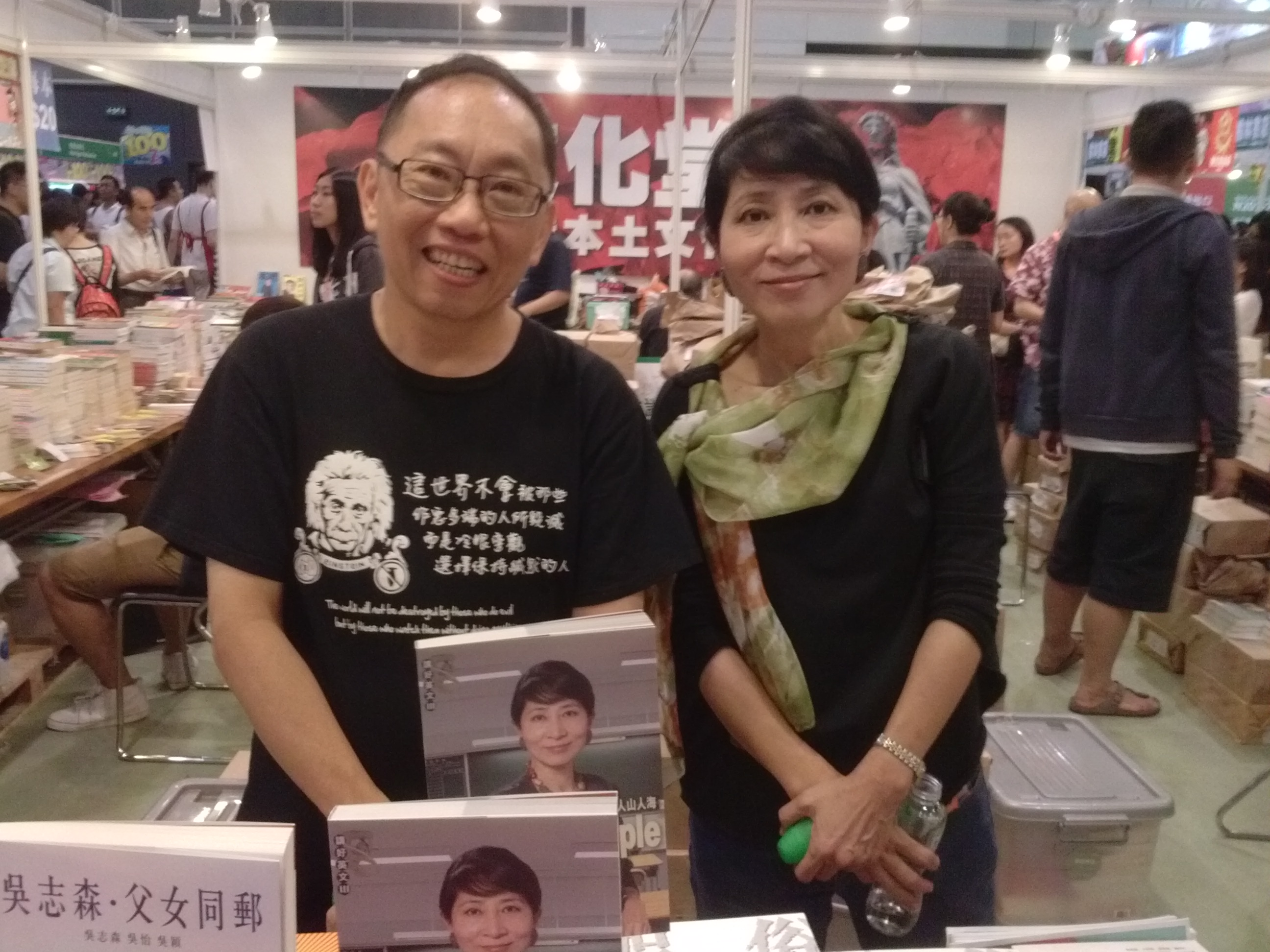 Ng Chi Sum and Claudia Mo at Hong Kong Book Fair 2013.